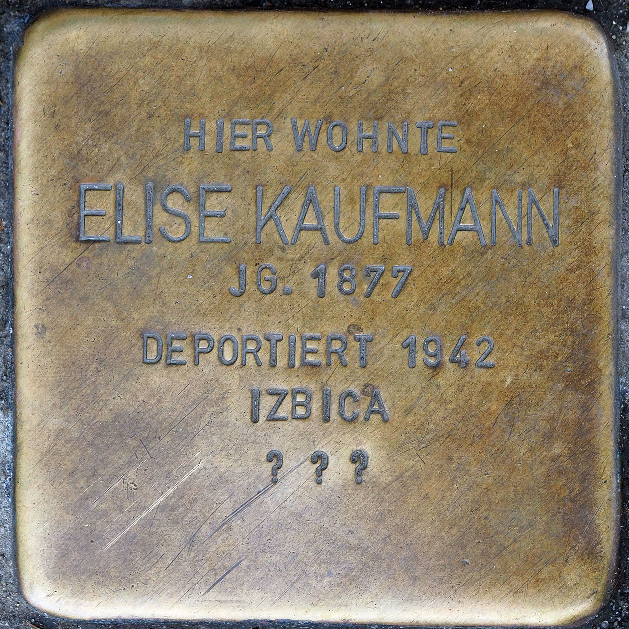 Stolpersteine MG: Kaufmann, Elise